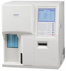 Хематологичен брояч Sysmex КX21-N